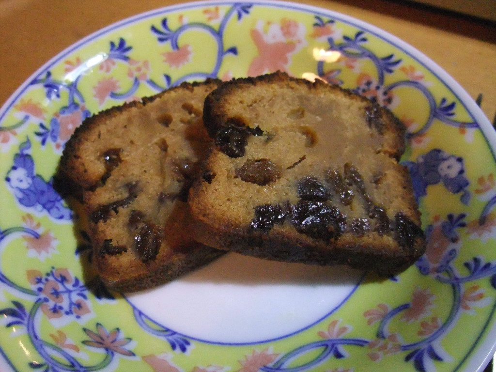 ラムレーズン入りのパウンドケーキ